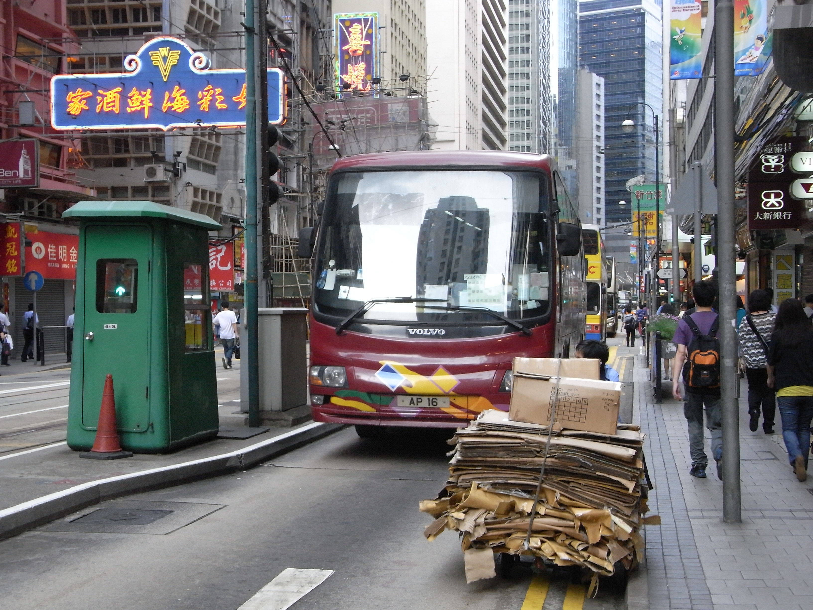 香港島德輔道中的上環電車站、富豪巴士及二手紙皮回收工，背景為好彩海鮮酒家